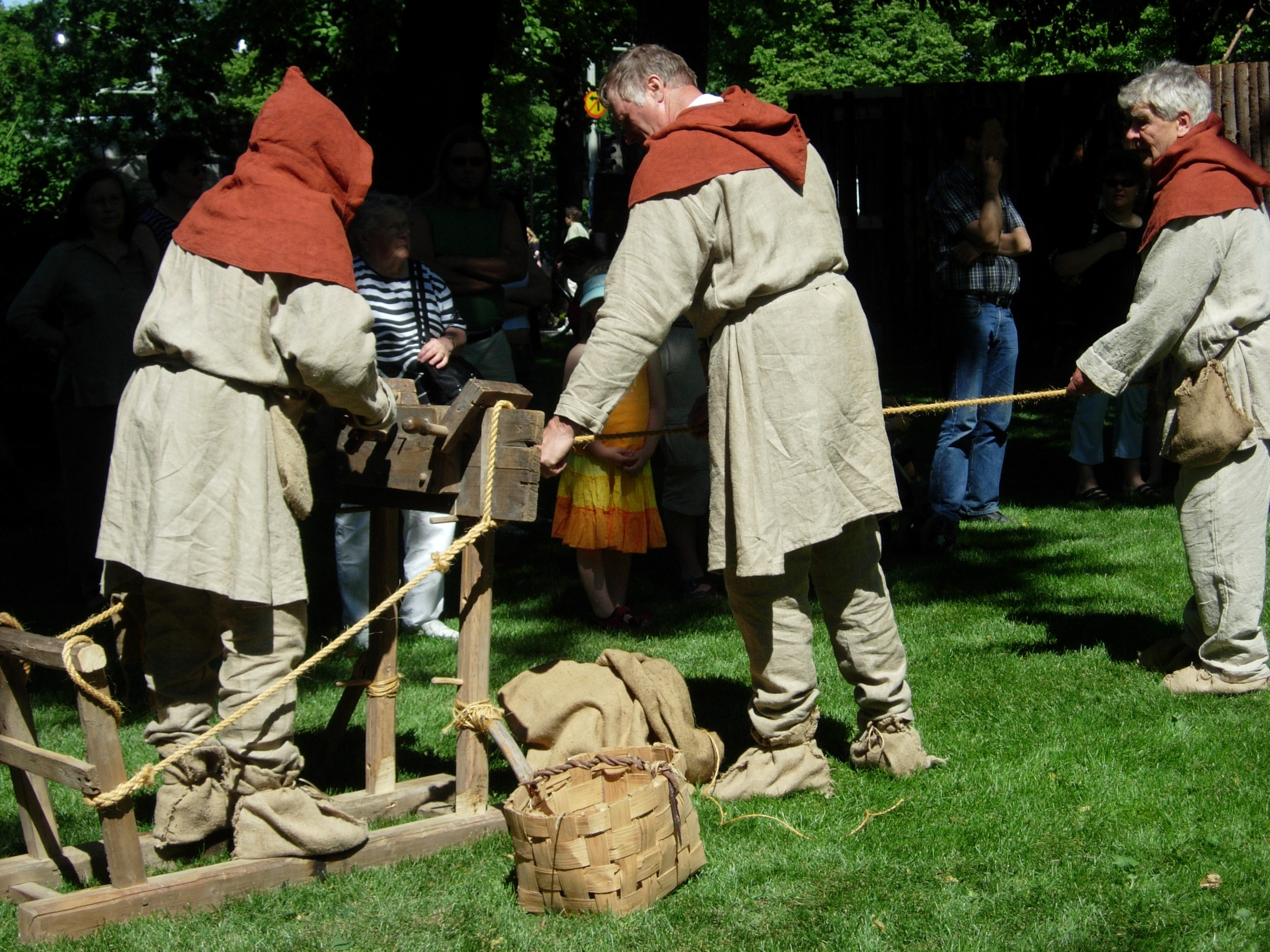 Turku Medieval Market 2005.